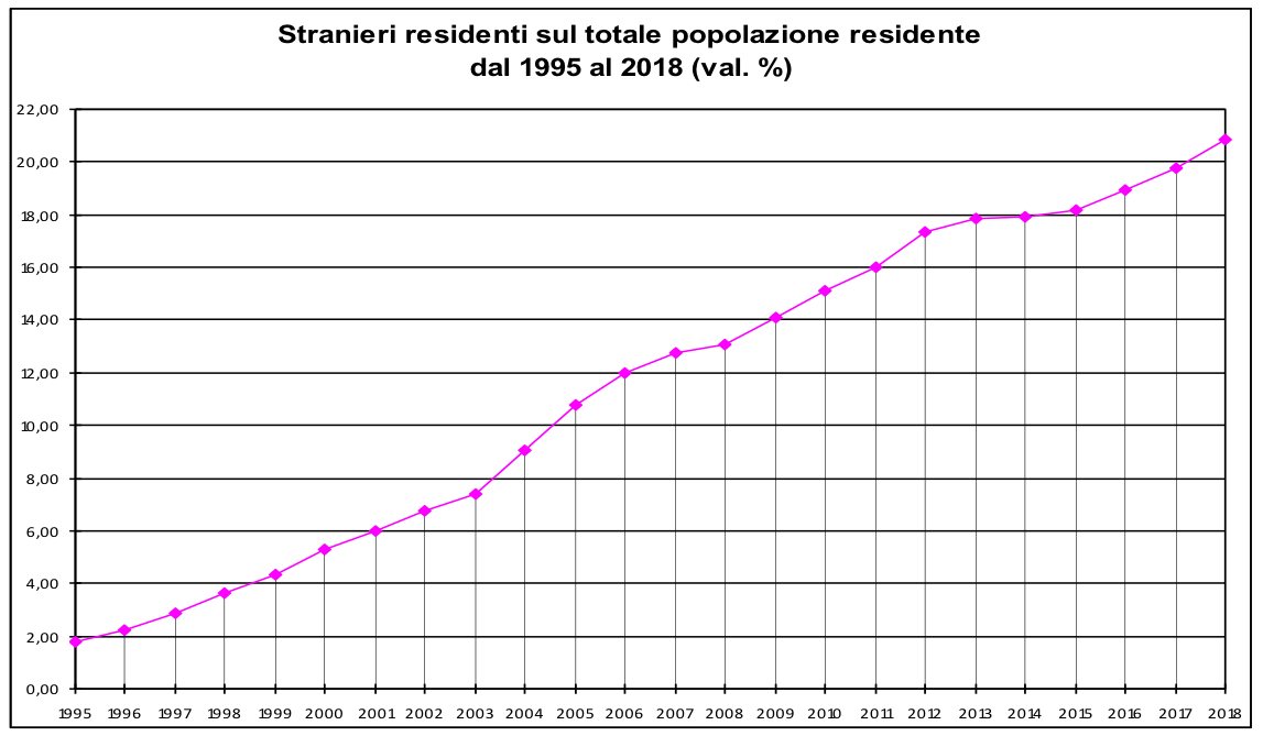 statistica sulla popolazione residente nel comune di prato al 31 dicembre 2018